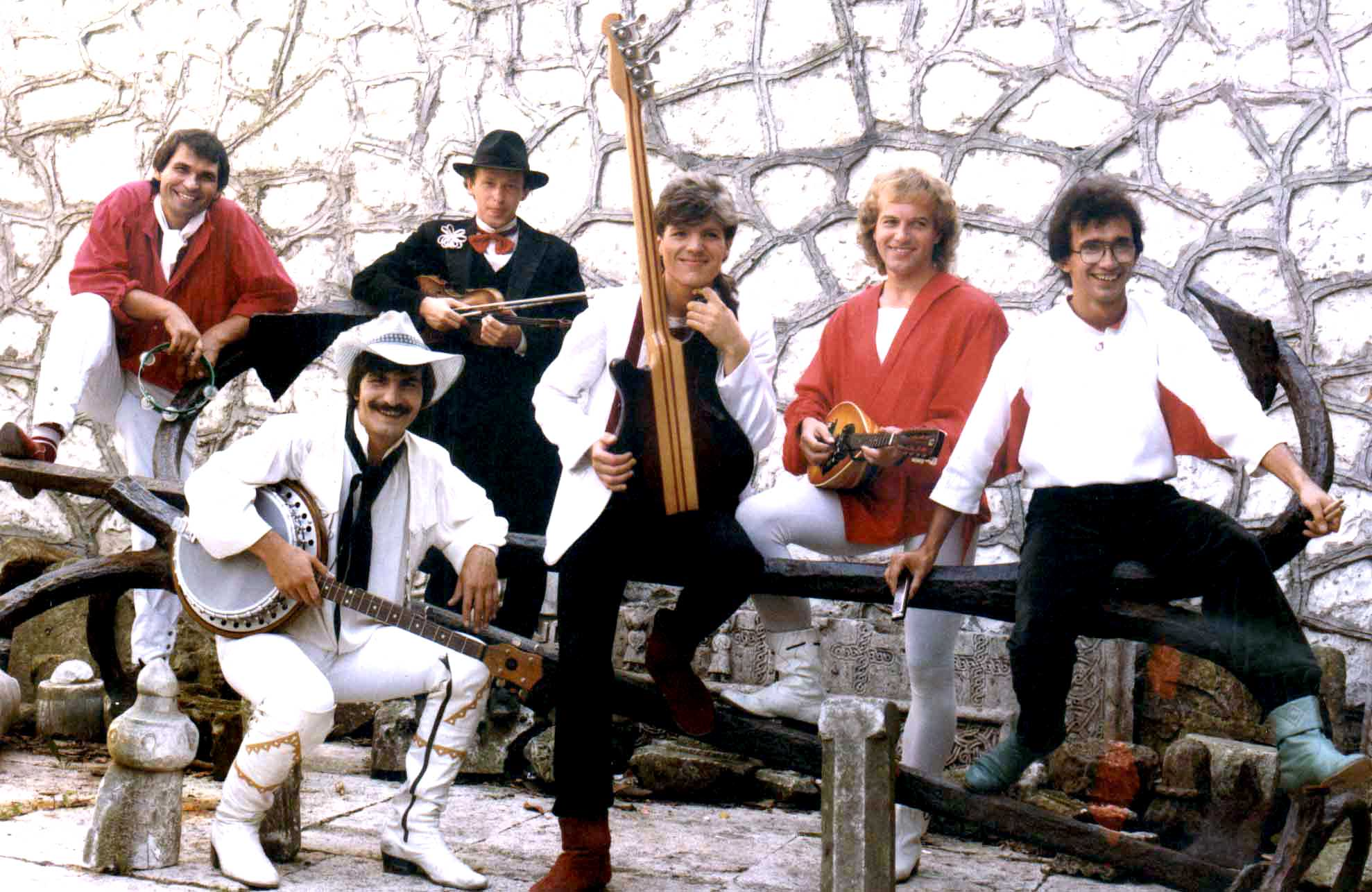 фотографии и афиши группы "Интеграл"